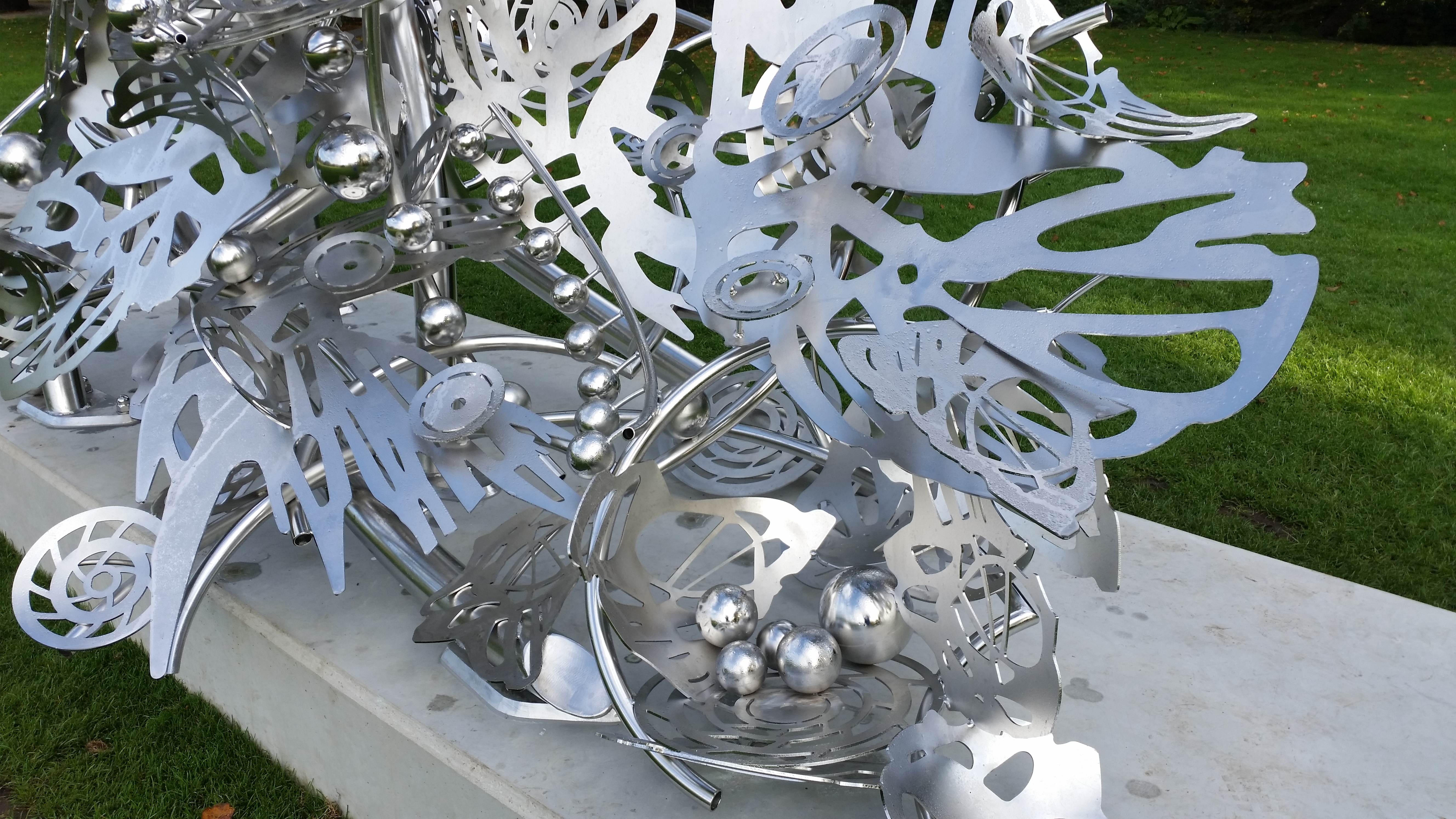 Detail van Future past glory in het Beatrixpark